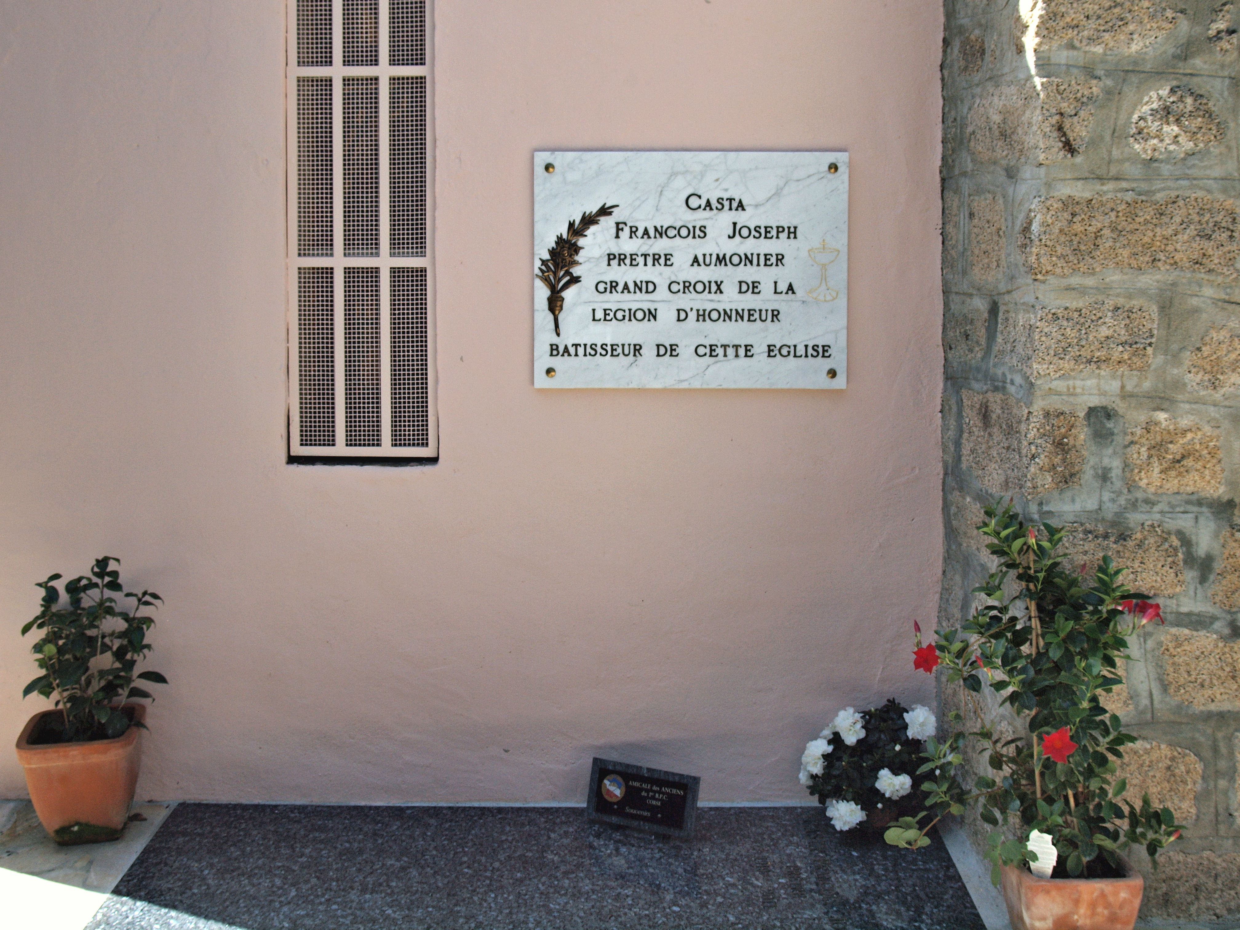 Pietrosella (Corse) - Tombe et plaque de l'abbé François Casta, prêtre aumonier Grand croix de la Légion d'Honneur